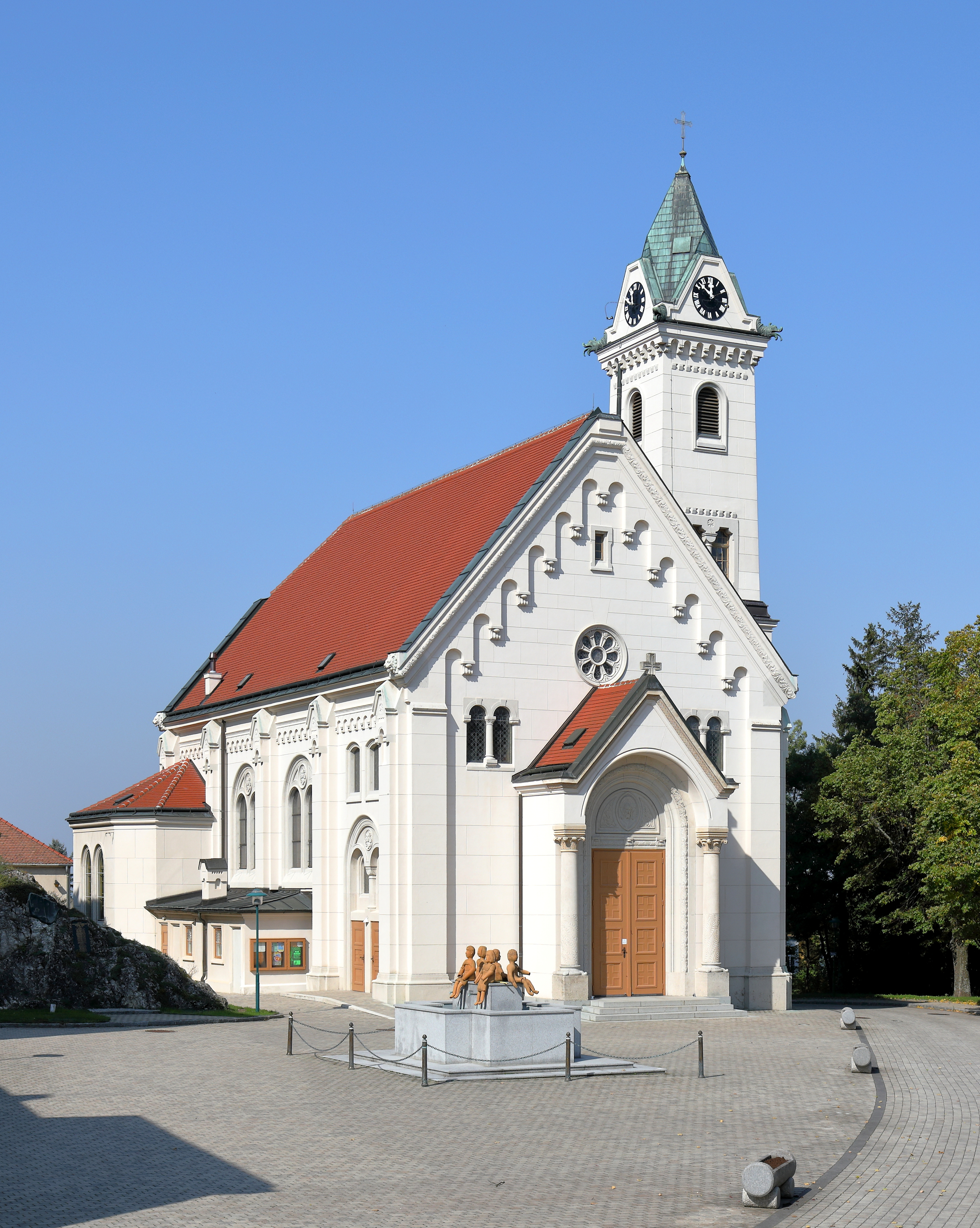 Südostansicht der röm.-kath. Pfarrkirche hl. Martin in der niederösterreichischen Marktgemeinde Staatz. Die neoromanische Kirche am Fuß der Staatzer Klippe wurde an Stelle einer älteren Kirche nach Plänen des Architekten Viktor Siedek erbaut und 1907 geweiht.